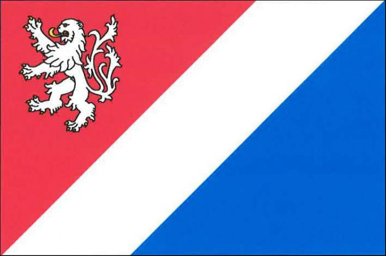 vlajka, Kostelec nad Labem, okres Mělník